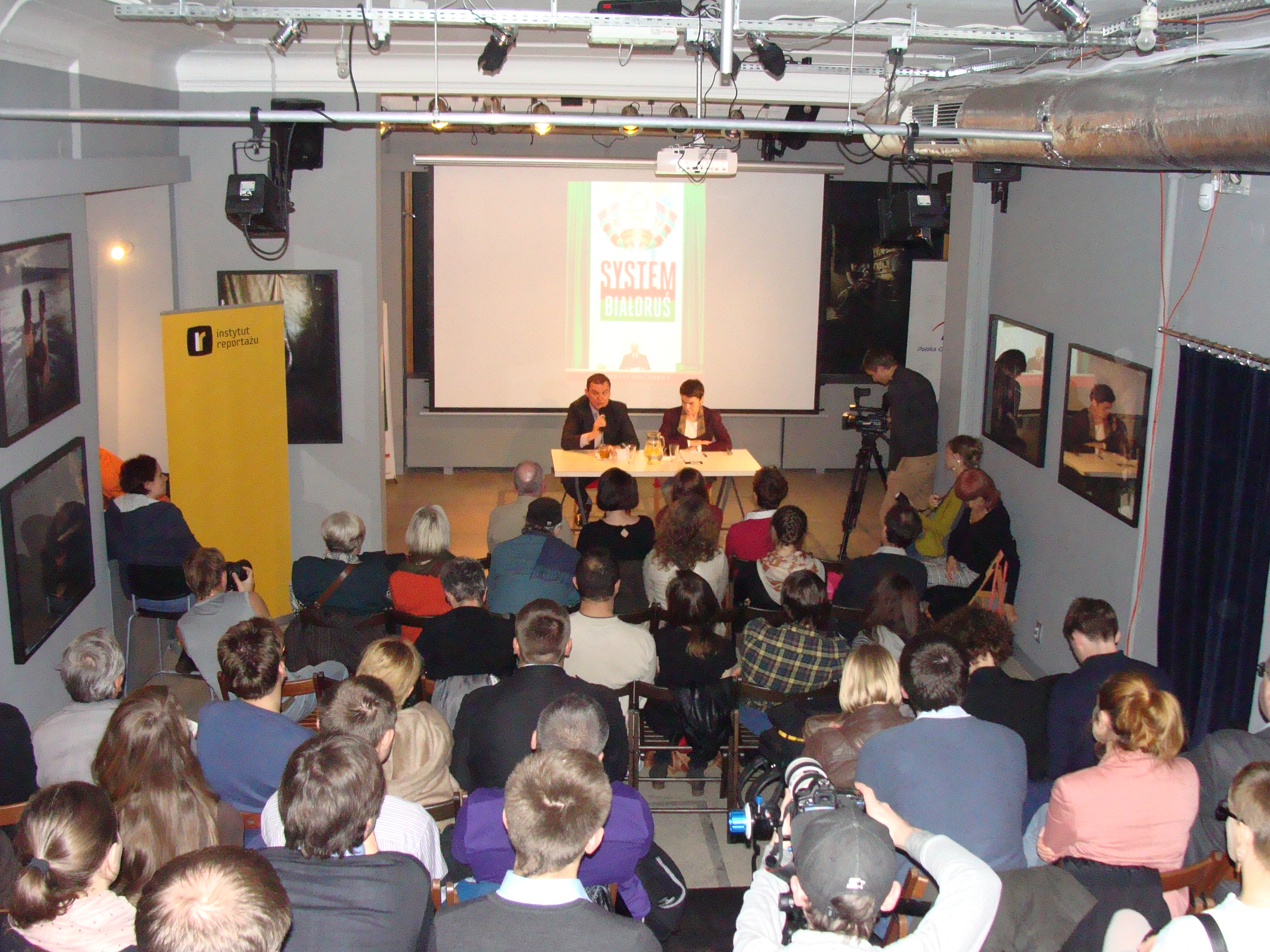 Białoruski dziennikarz polskiej narodowości, działacz Związku Polaków na Białorusi Andrzej Poczobut oraz Maria Przełomiec podczas prezentacji książki "System Białoruś" w Warszawie.